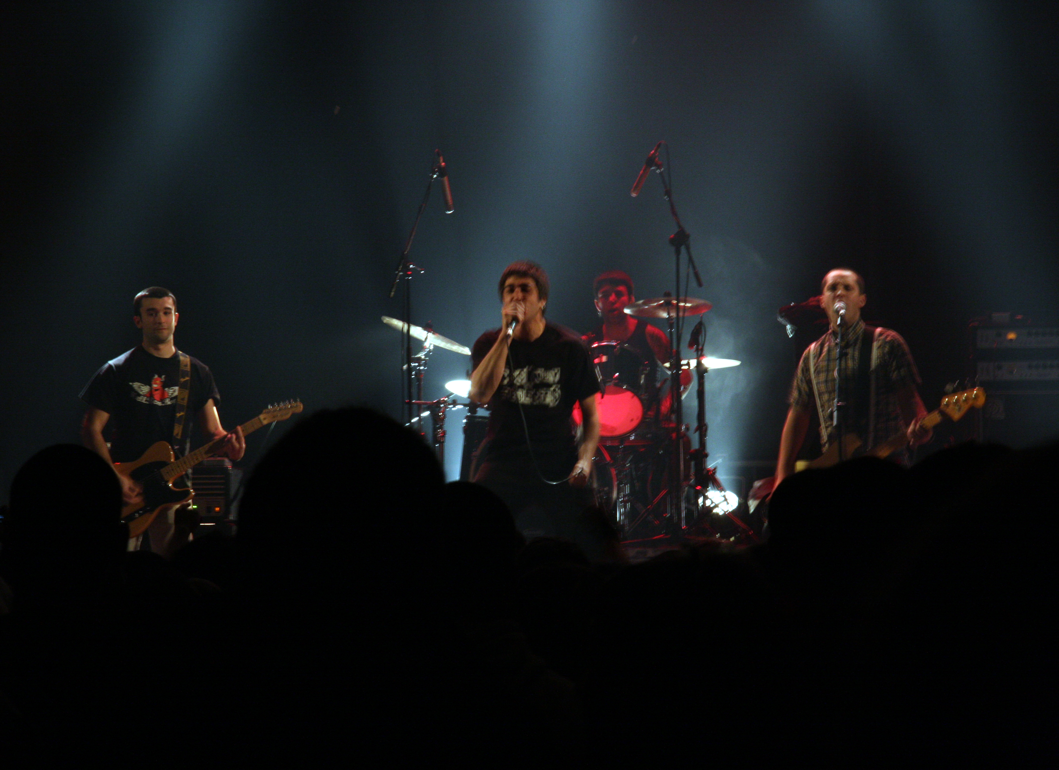 Arrasateko Enboskata taldearen kontzertua.